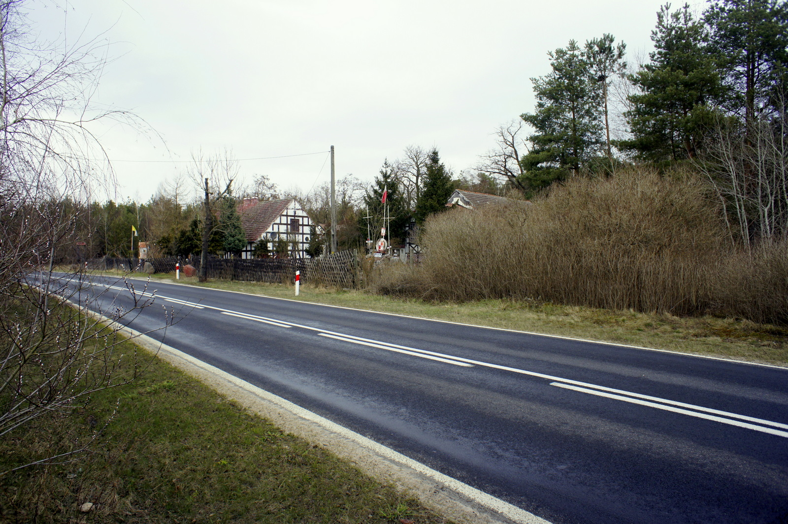 Dobrojewo - szachulcowy dom przy szosie ( DW nr 159 )